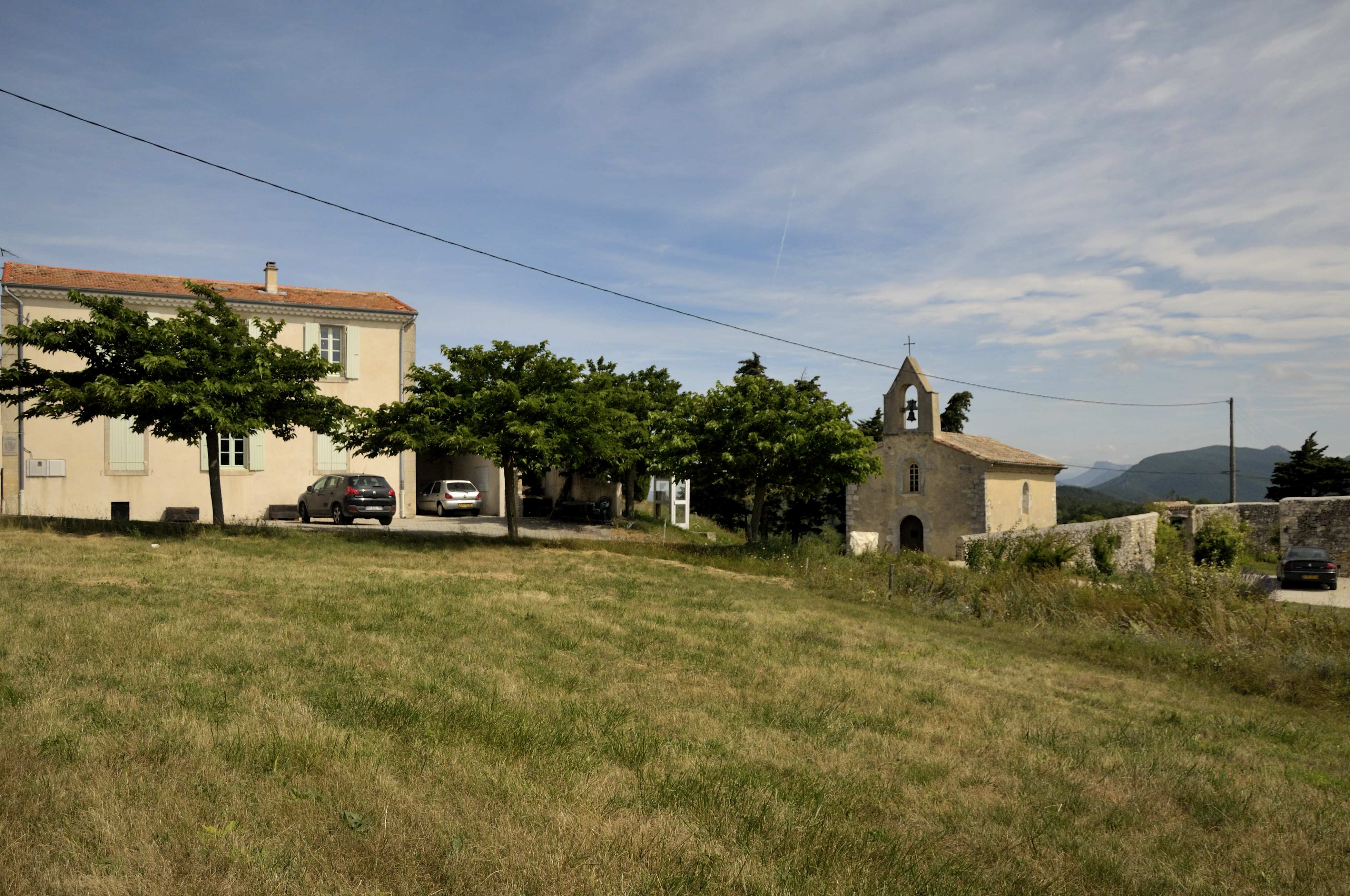 mairie et église d'Aleyrac